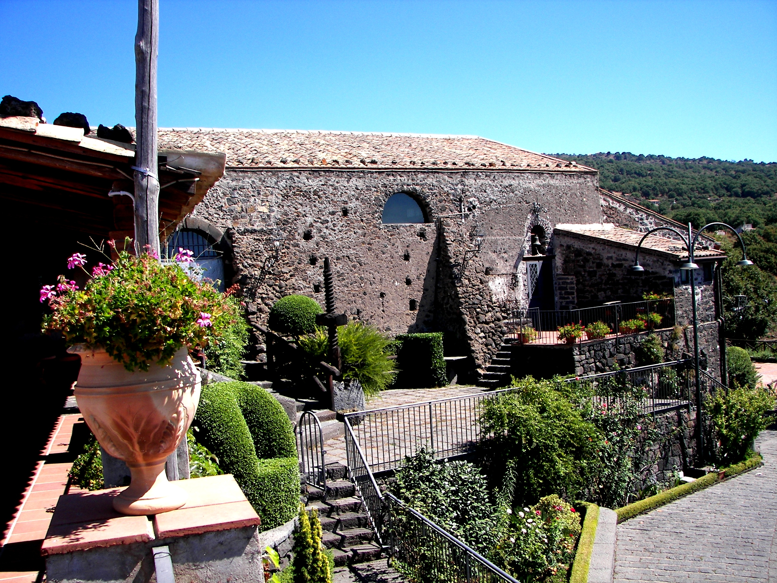 Casina del Cavaiere, ex Rettoria Benedettina, sec XIV. Santa Maria di Licodia